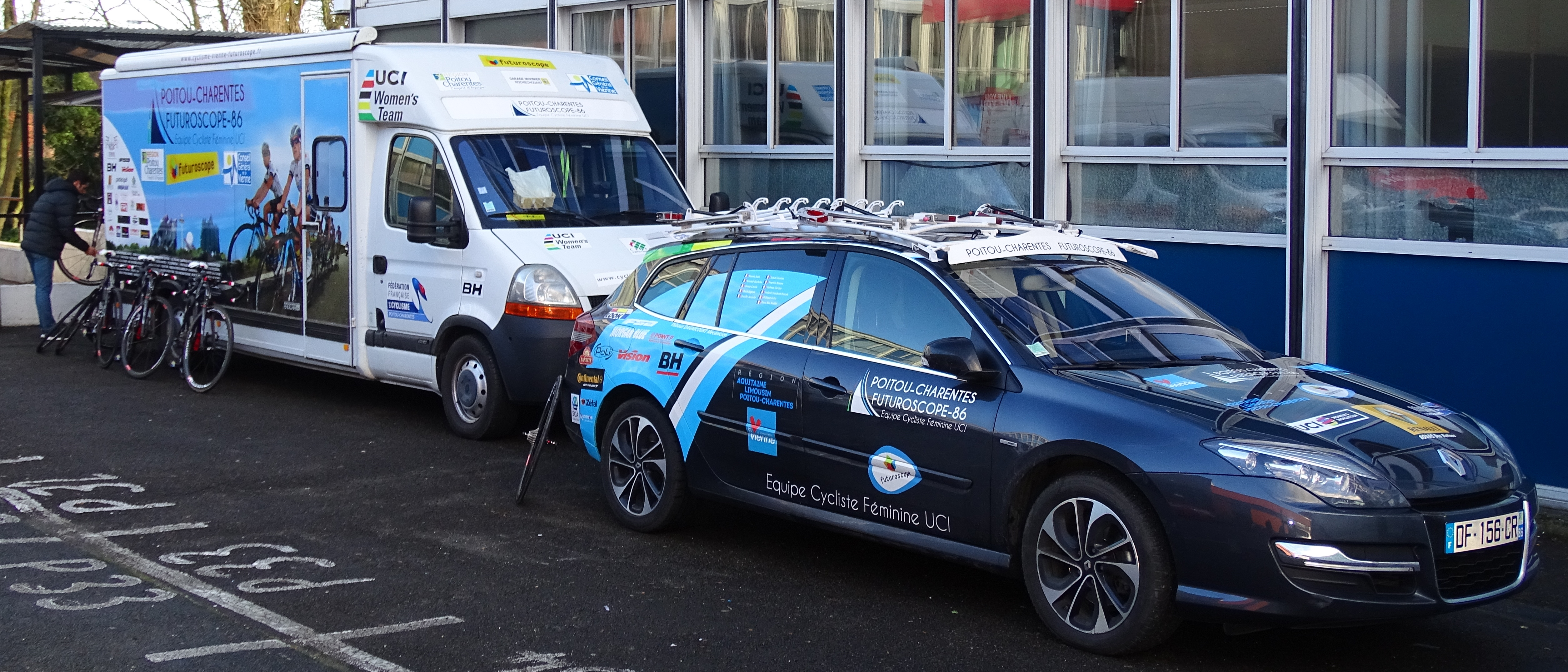 Reportage réalisé le mercredi 2 mars à l'occasion du départ du Samyn des Dames 2016 et du Samyn 2016 à Quaregnon, Belgique.